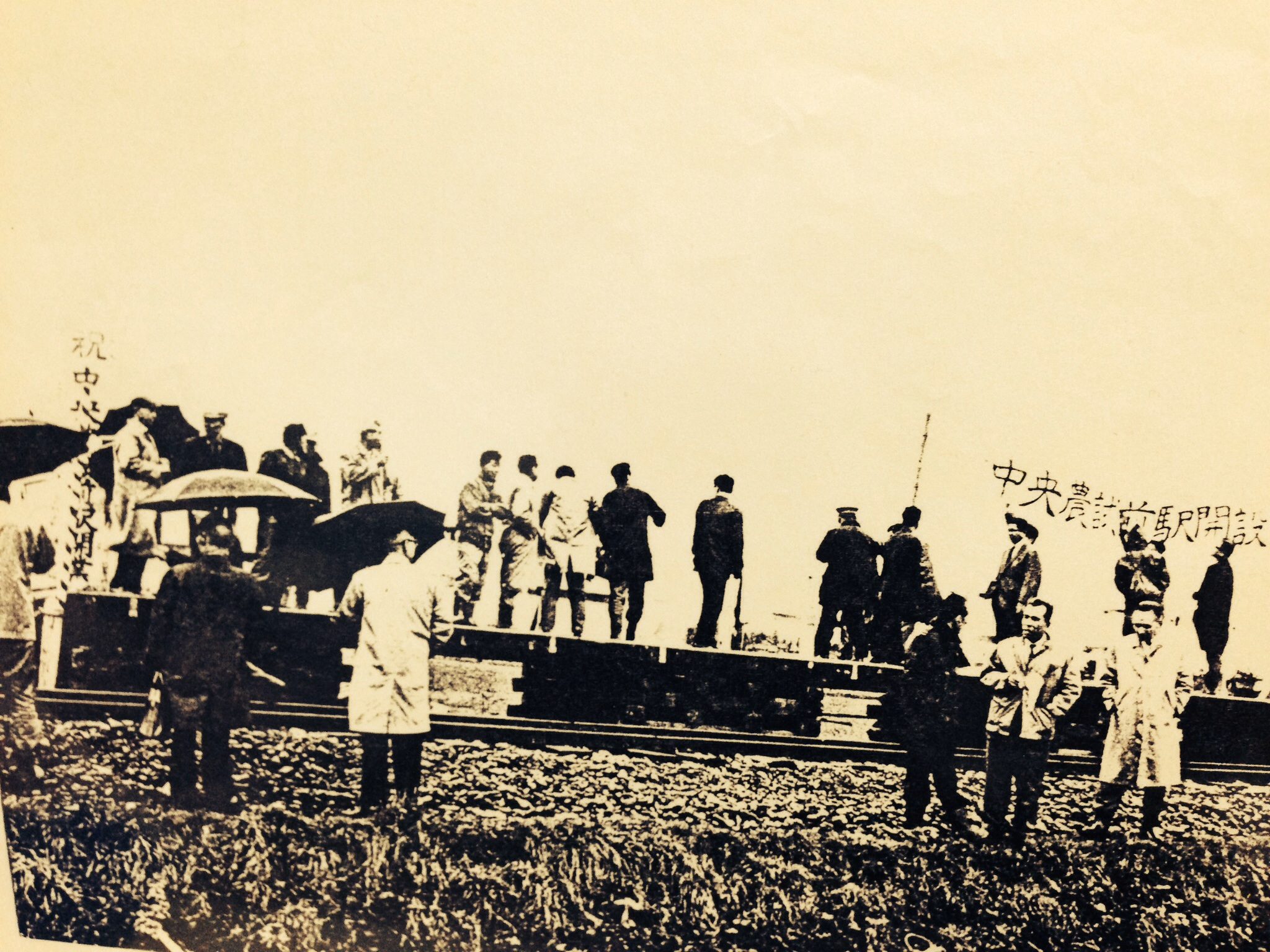 駅を遠望